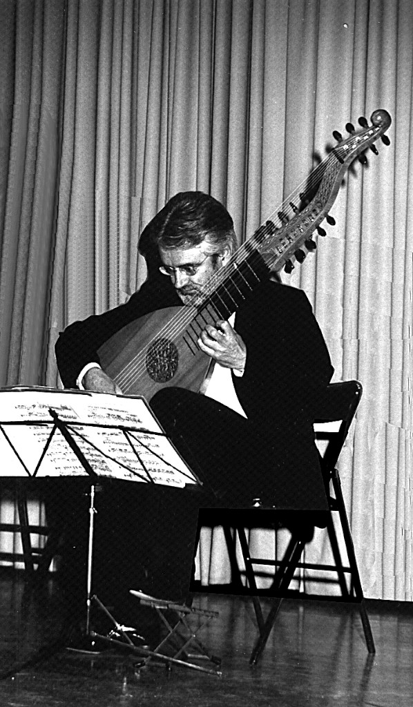 Concert à Granada